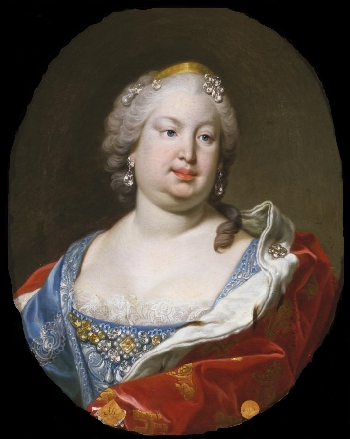 Retrato de la reina Bárbara de Braganza (1711-1758), que fue reina consorte de España por su matrimonio con Fernando VI de España.